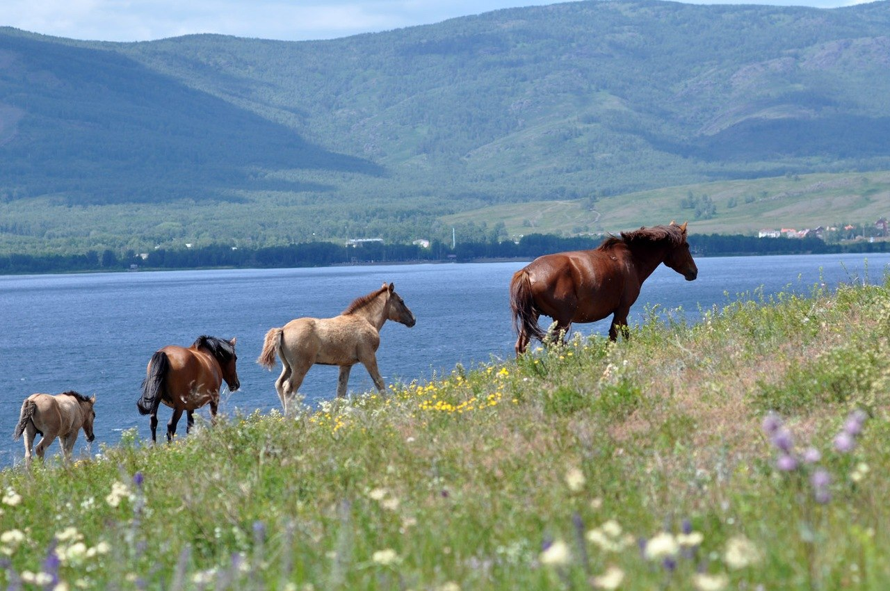 Якты-Куль (Банное озеро), Абзелиловский район. This image is related to the protected area of Russia number 0200017